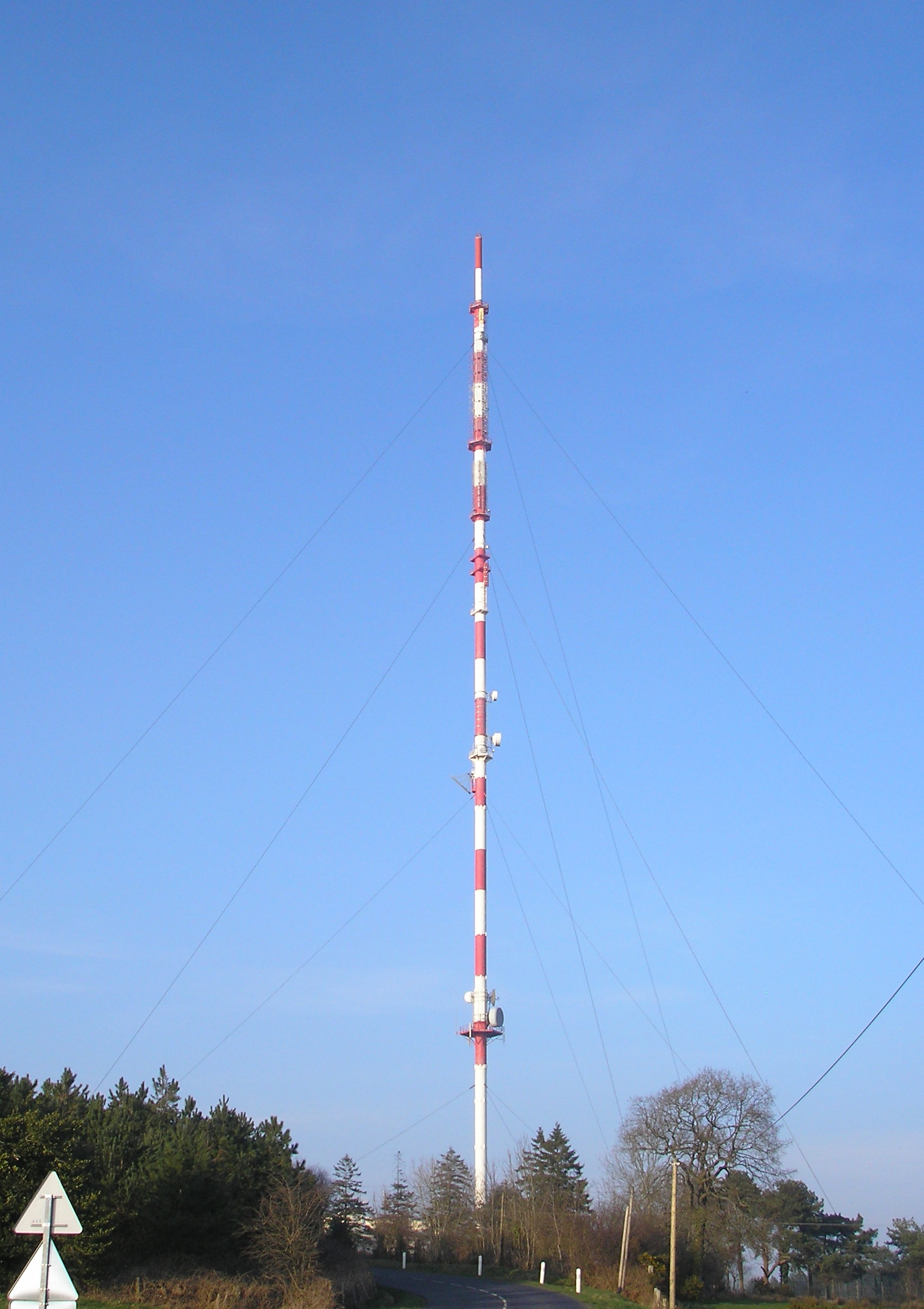 Le Plessis-Grimoult (Normandie, France). L'antenne TDF.